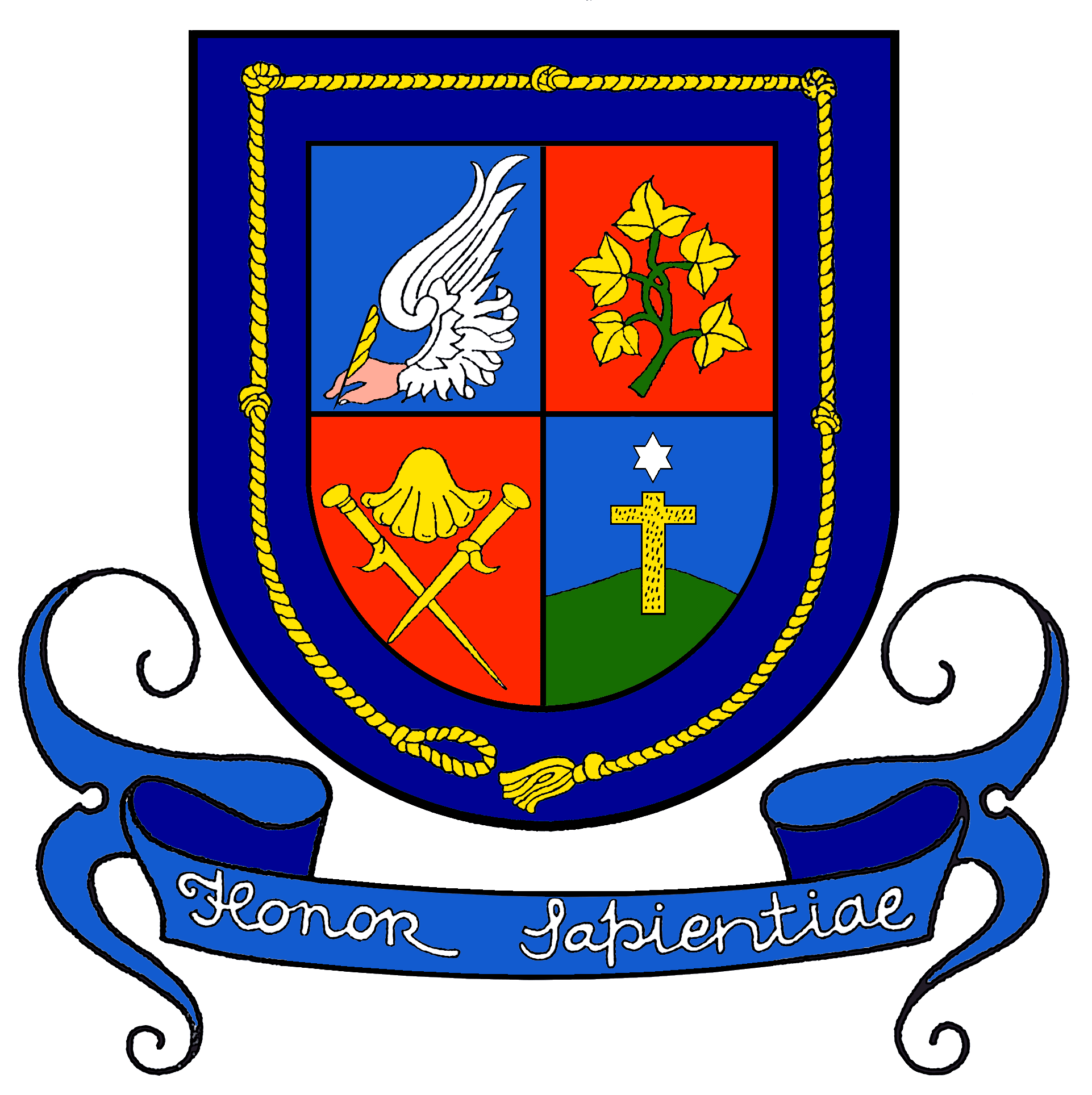 Português do Brasil: No primeiro de blau, uma asa aberta de prata, terminada por uma mão de carnação, formada de uma pena de ouro; O segundo de golles, carregado de uma figueira folhada de cinco peças de ouro; O terceiro de golles, carregado de dois bordões de Sant' Yago, de ouro, postos em haspas e encimados por uma vieira do mesmo metal; O quarto de blau, onde surge uma estrela de prata, sobre um campo de sua cor e nela sancada uma cruz latina de ouro, gotada de golles; bordadura de blau com um cordão de São Francisco de ouro, posto em orla. Divisa Em listel do mesmo esmalte e legenda de prata: HONOR SAPIENTIAE; que se traduz: Honra da Sabedoria. Simbologia Histórica A asa afirma o voo do tempo a nos transmitir a tradição que nos preserva a história, a ciência e a cultura. O ramo da figueira, alude ao timbre dos Figueirôa, apelido que procede Espanha, desde os recuados tempos em que os discípulos do Apóstolo Sant' Yago converteram os tais à fé cristã; daí, passando a Portugal, tendo geração da qual descendeu BENTO LUIZ DE FIGUEIRÔA, colonizador da região que deu origem ao Município. Os bordões de Sant ' Yago, trazem a imagem genealógica, sob as quais uma vieira de ouro tomada a tradicional proveniência ligado a pessoa de BERNARDO VIEIRA DE MELO. A cruz evoca o Monte dos Guararapes, marco da nacionalidade e patriotismo, levados pelo heroísmo e pela fé, sob a proteção da SANTA MÃE DE DEUS, prefigurada na estrela. O síngulo, cinge como atributo ao religioso Frei Antonio de Santa Maria Jaboatão, que nos legou os mais remotos registros históricos.